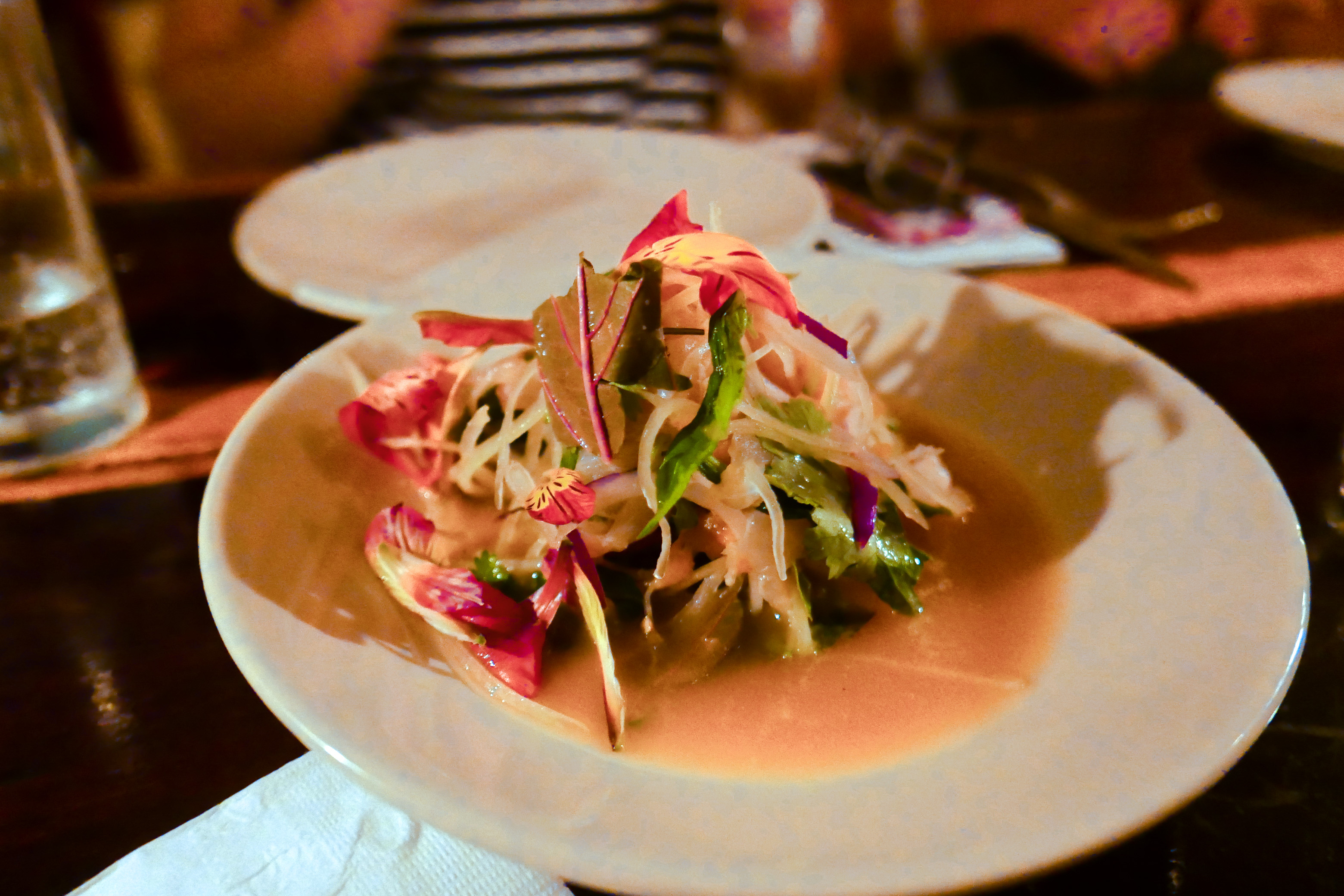 Tulum, Quintana Roo.